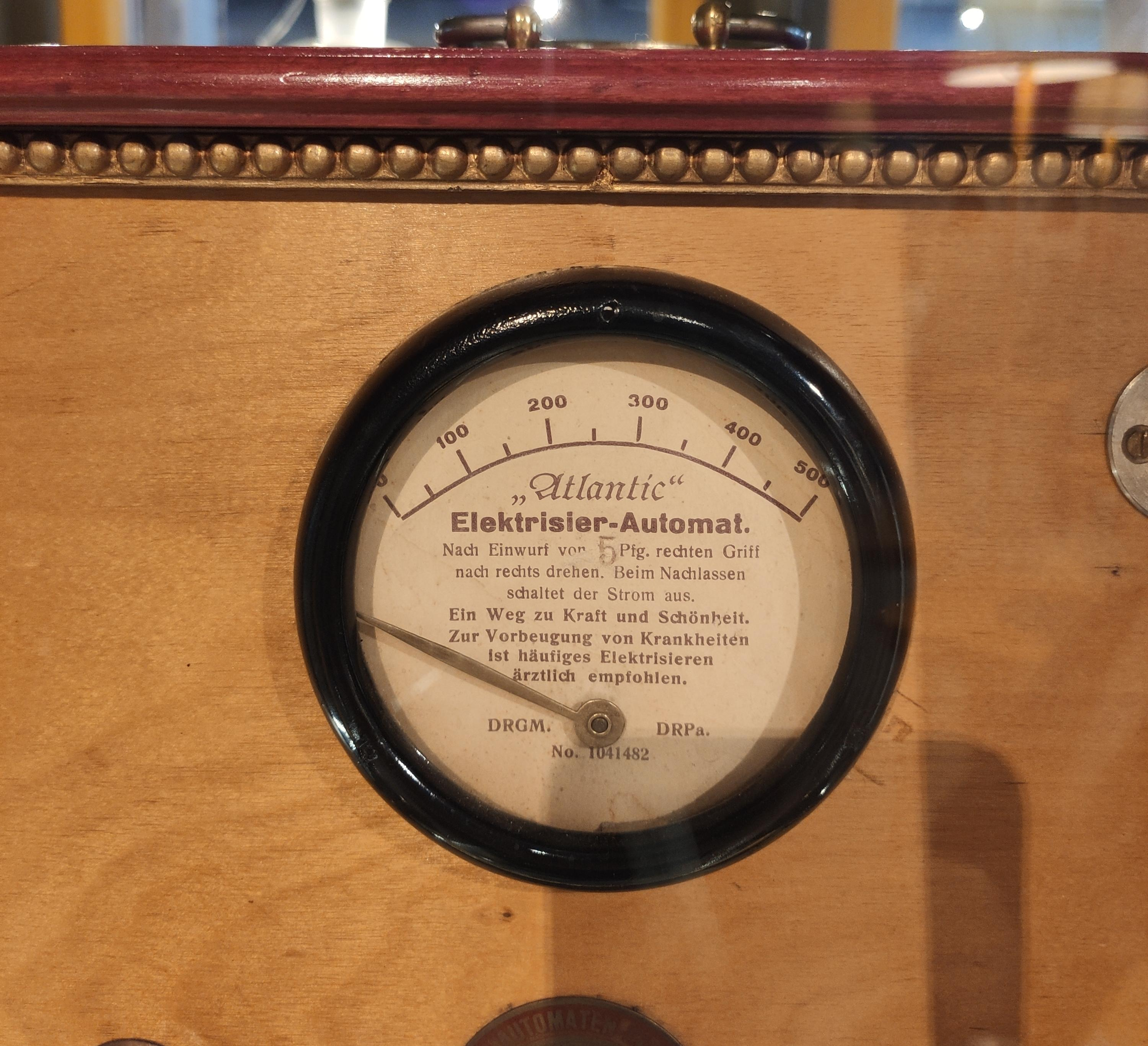 Nahaufnahme der Skala des Elektrisiergerätes. NEMO Amsterdam